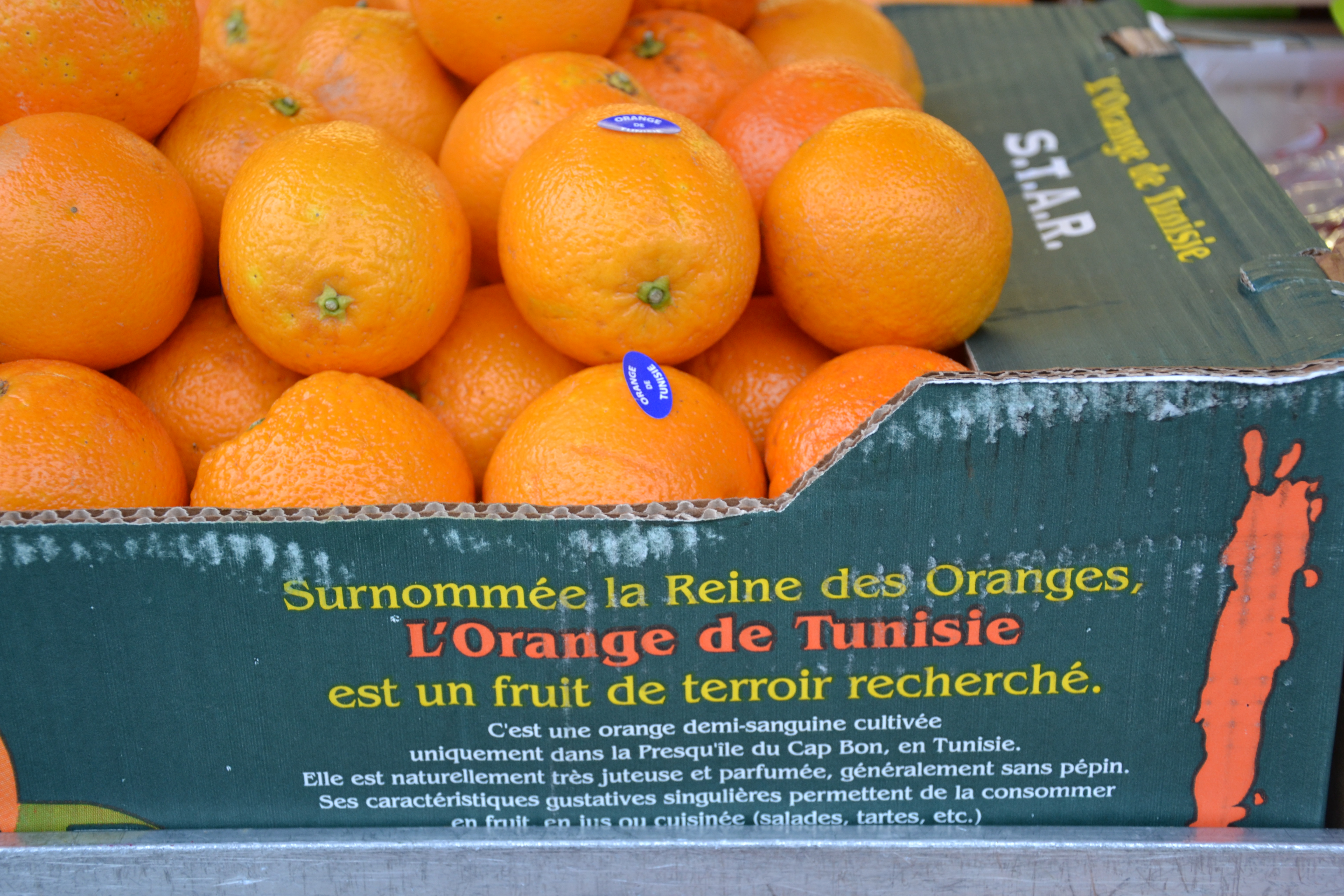 Oranges maltaises de Tunisie sur un marché en France (janvier 2016)